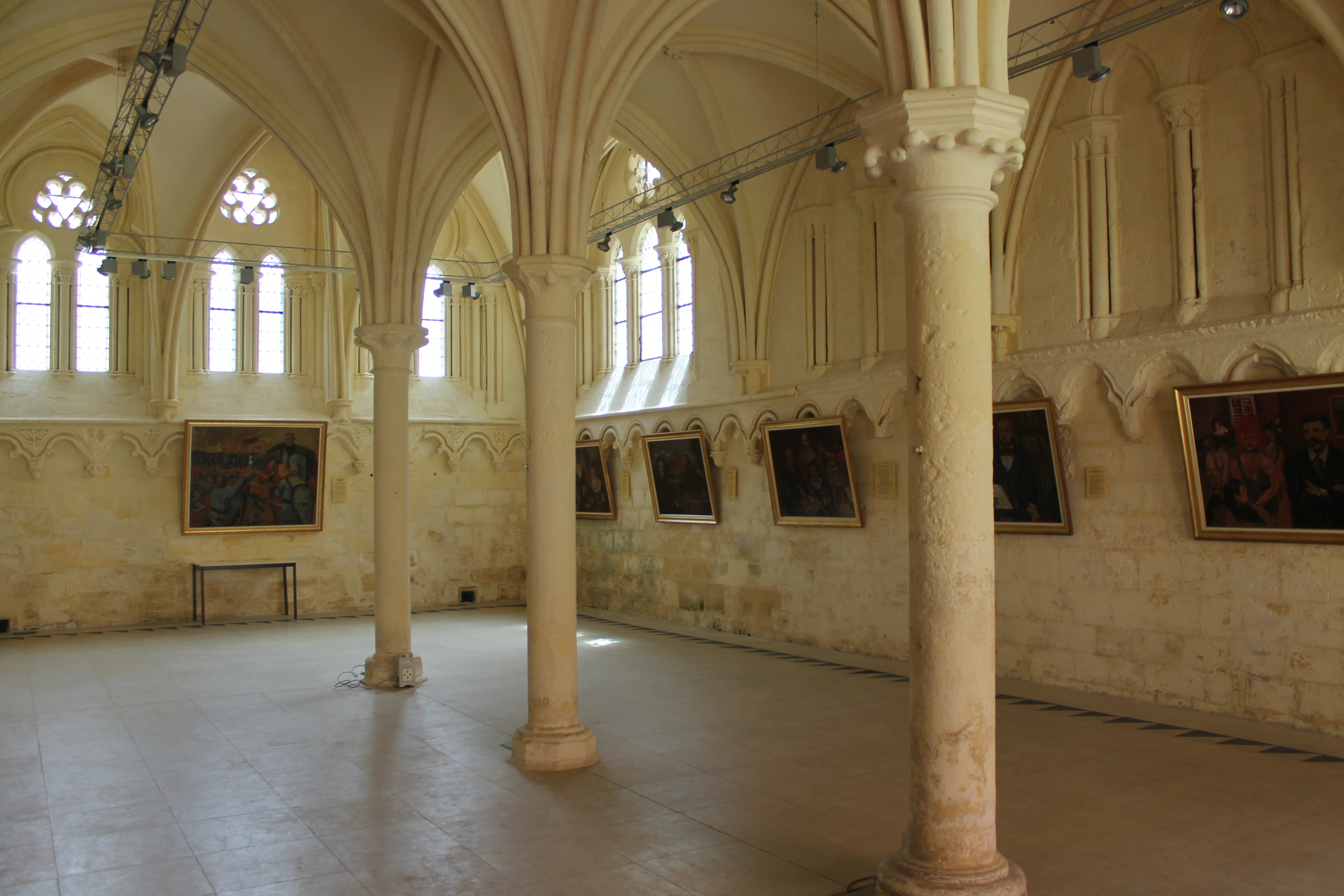 Salle capitulaire du XIIIe de l'abbaye de Saint-Pierre-sur-Dives (Calvados) Base Mémoire